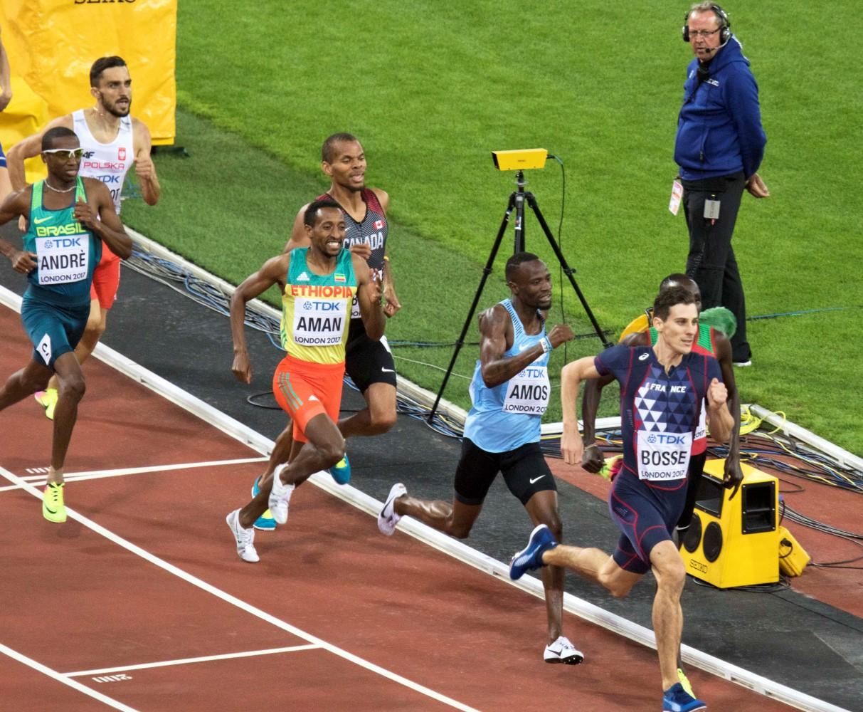 d4_32 800m finale mannen